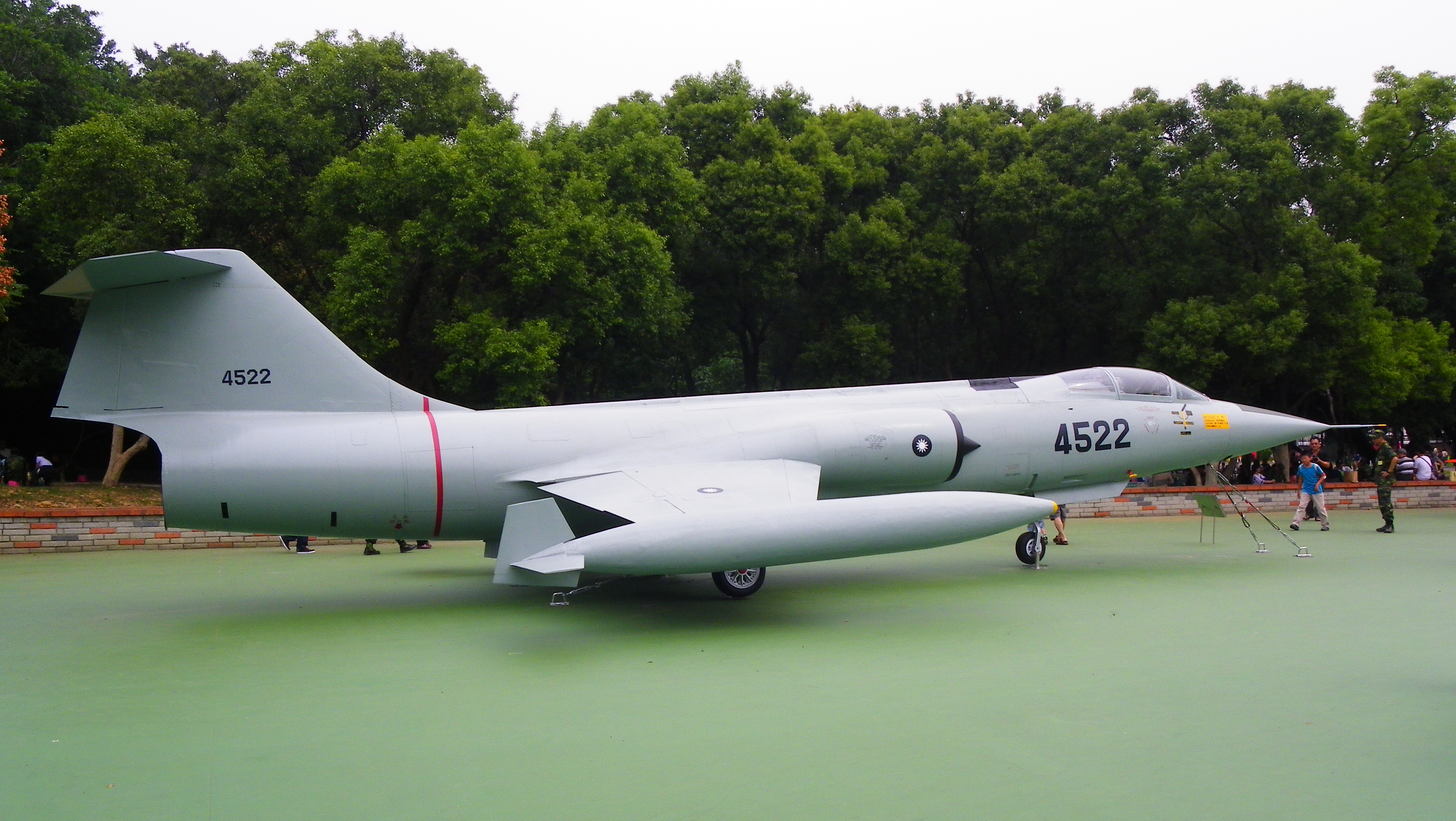 成功嶺展示的中華民國空軍F-104J（編號4522）右側面。